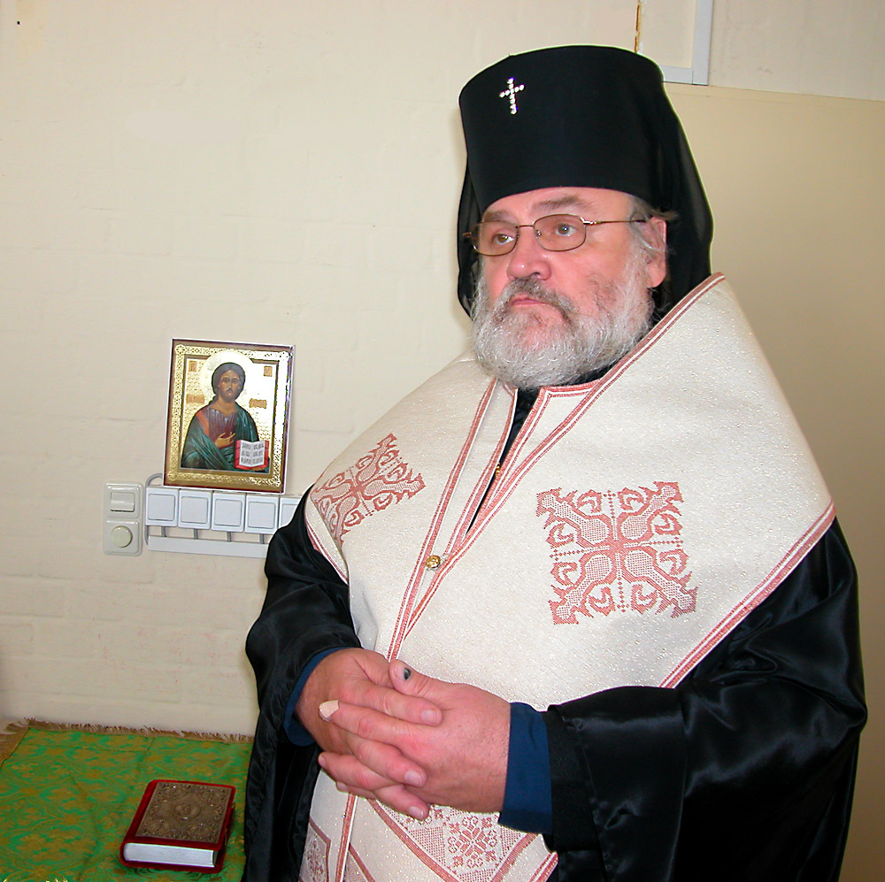 Erzbischof Longin von Klin (Duesseldorf)